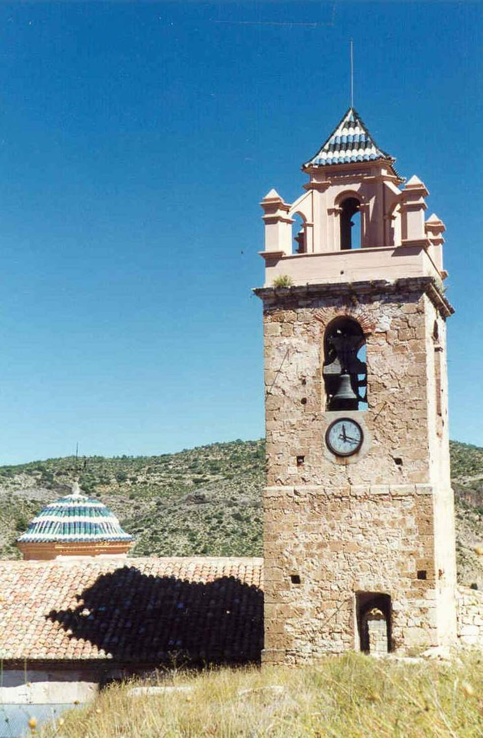 El campanario es una estructura exenta, ubicada en el solar del castillo, a la cabecera del templo, lado de la epístola y forma parte del conjunto monumental de la Iglesia-fortaleza de Castielfabib (Valencia).